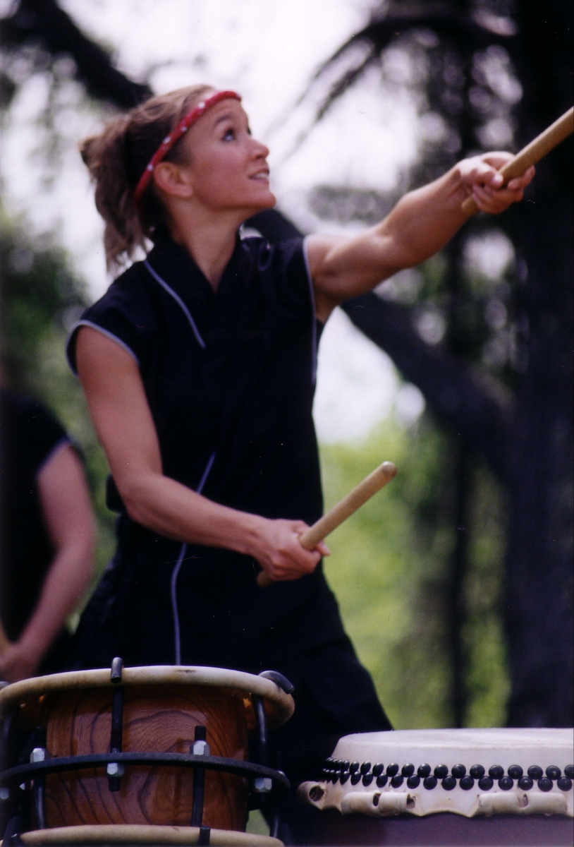 Taiko drumming at Kurimoto Gardens spring festival in Canada.